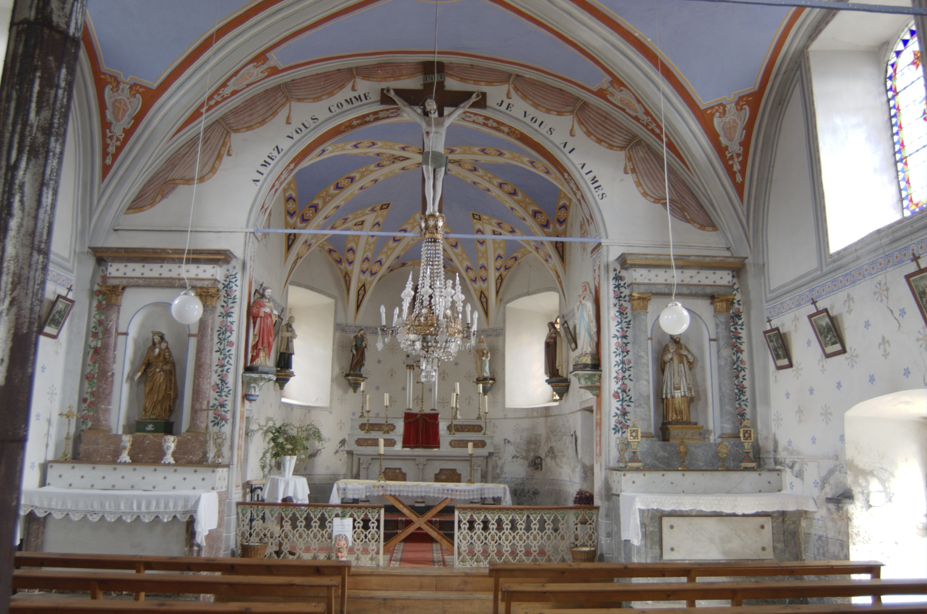 Le cœur de l'église de Cohennoz